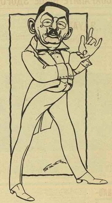 Думский церемониймейстер П. Н. Крупенский. Карикатура из газеты «Новое время».